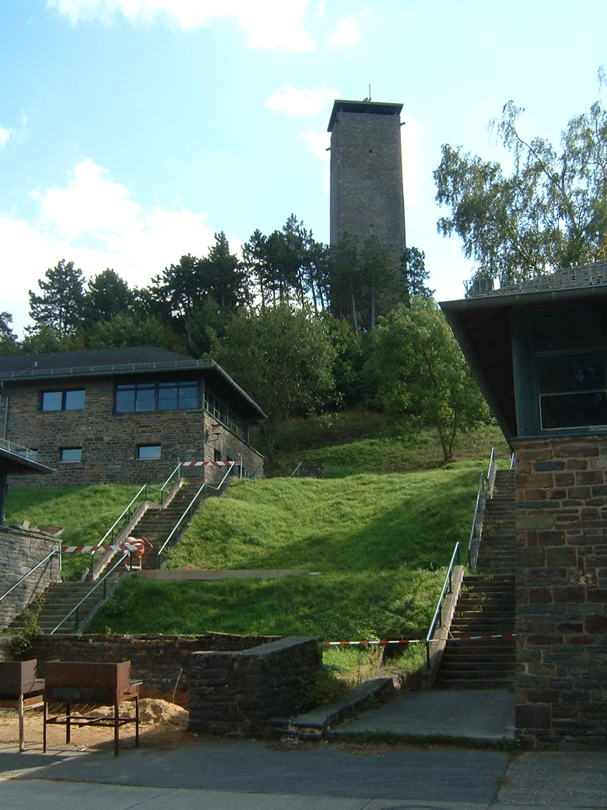 Burg Vogelsang Sommer 2004 Fahrradtour Christian Hilberath & Rainer Hilberath Bild:Blick_auf_Turm_Burg_Vogelsang2.JPG 21:45, 14. Jan 2006 . . Chilberath (Diskussion) . . 1200 x 1600 (1142867 Byte) (Burg Vogelsang, Sommer 2004 Fahrradtour Christian Hilberath & Rainer Hilberath)